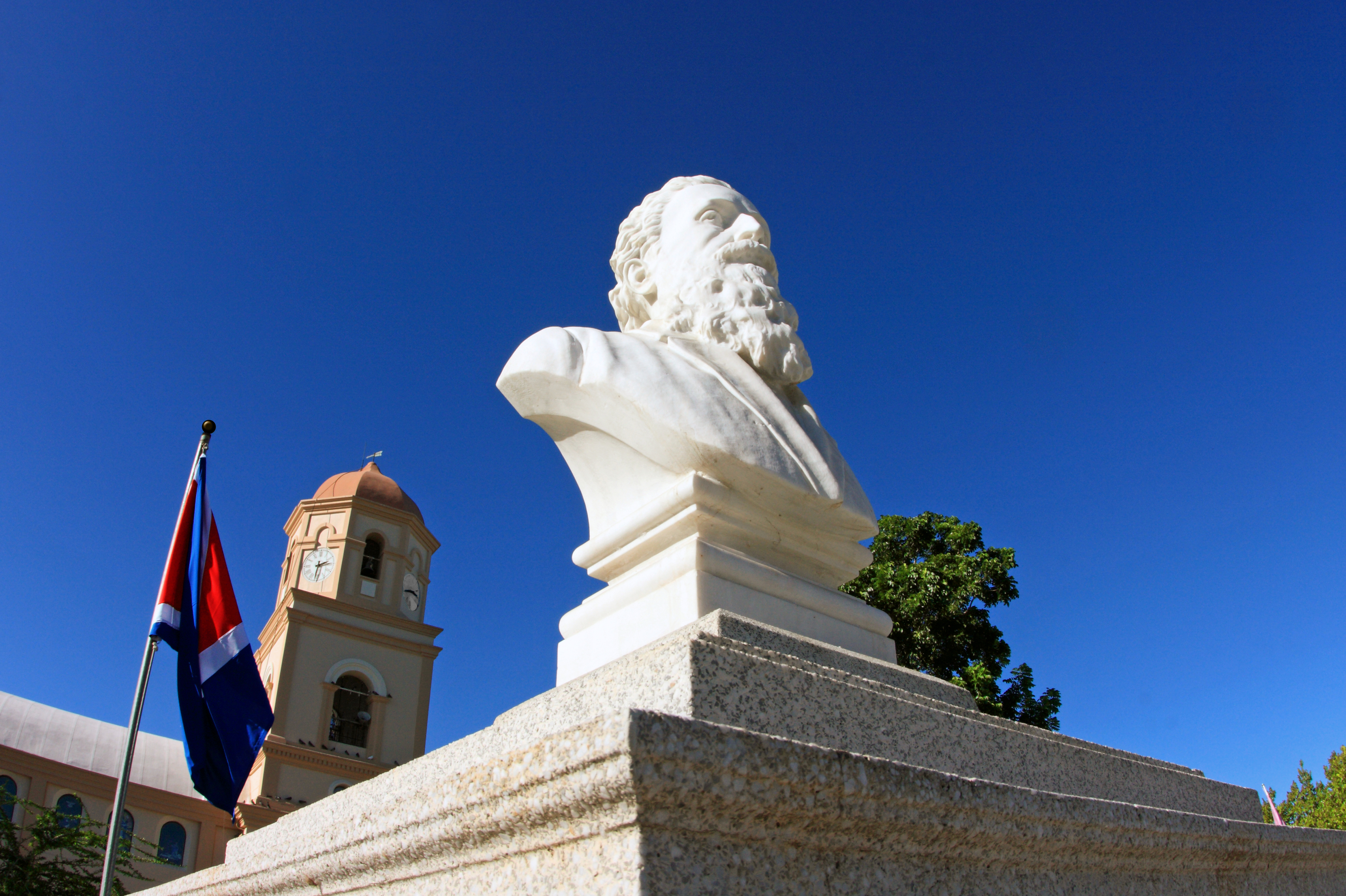 Busto de Betances, Plaza Pública Dr. Ramón Emeterio Betances y Alacán.